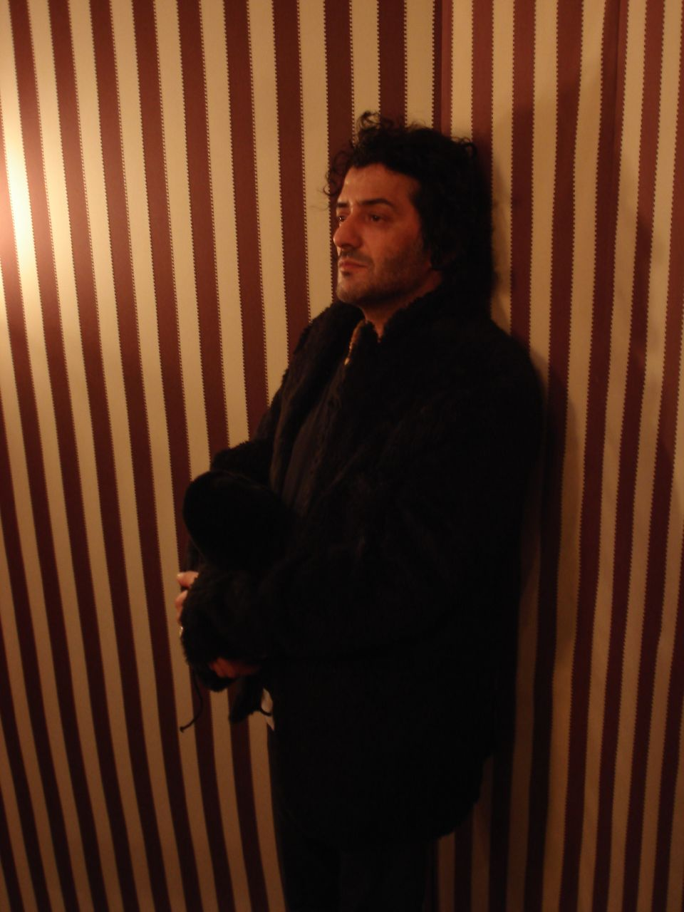 MorganeC